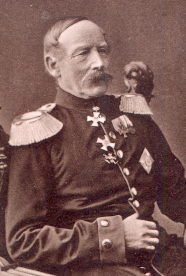 Adolph von Randow eigenes Photo aus Familienarchiv